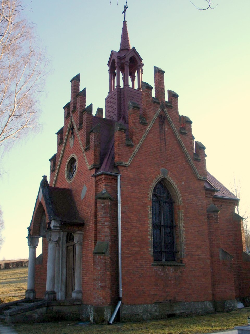 Kaplica grobowa rodziny Pieściorowskich w Kuźminie